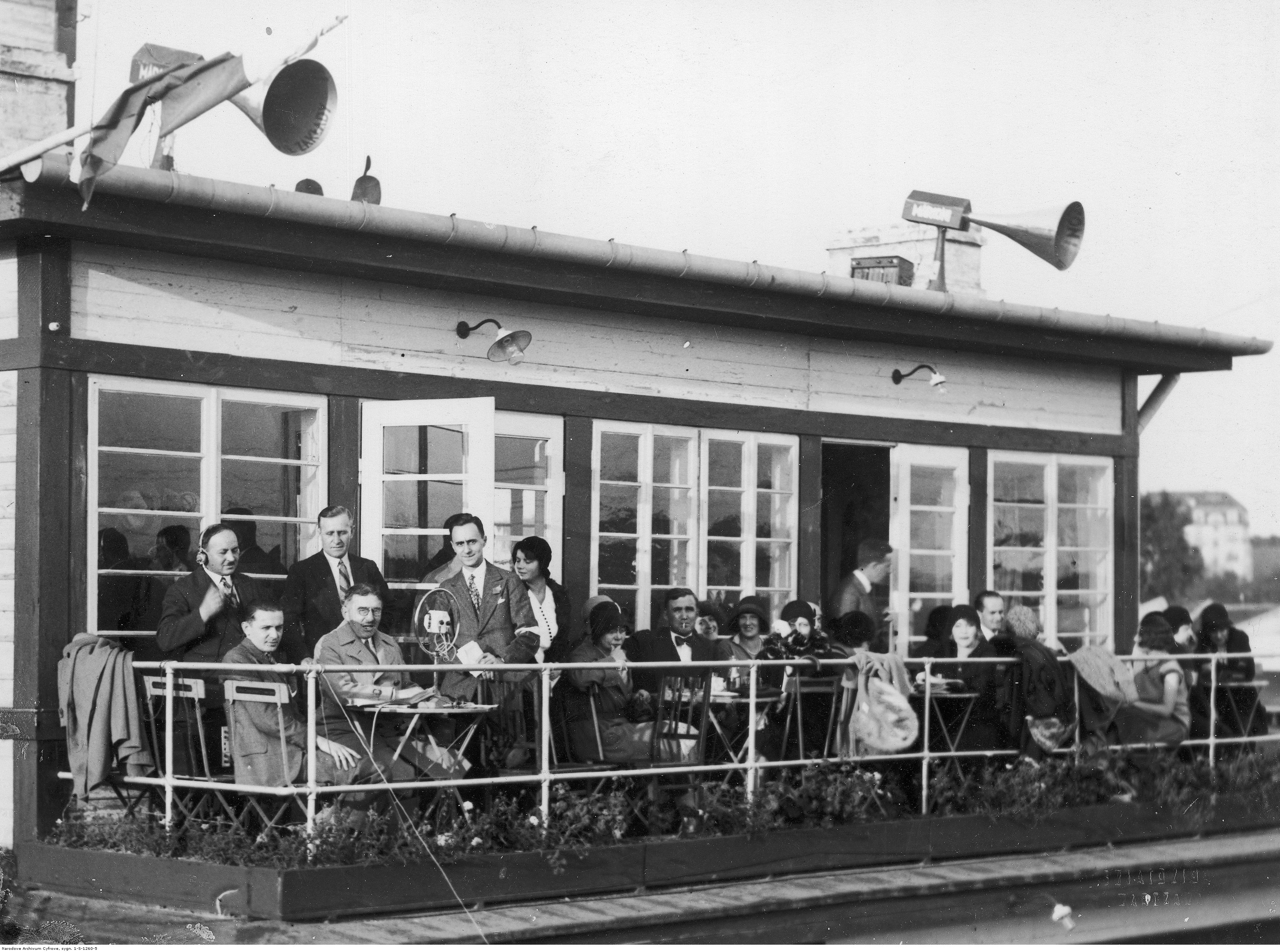 Obserwatorzy III Krajowego Konkursu Awionetek w Warszawie. Z lewej przed mikrofonem siedzą sprawozdawcy radiowi.